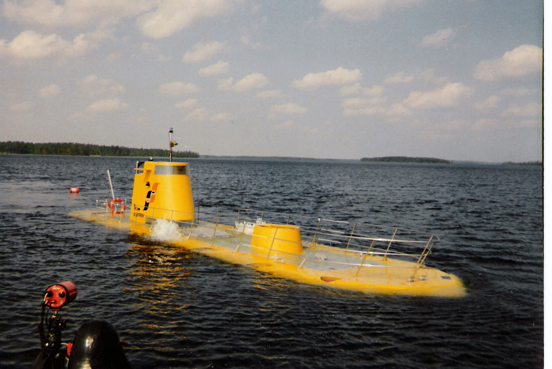 Suomalainen turistisukellusvene Simojärvellä